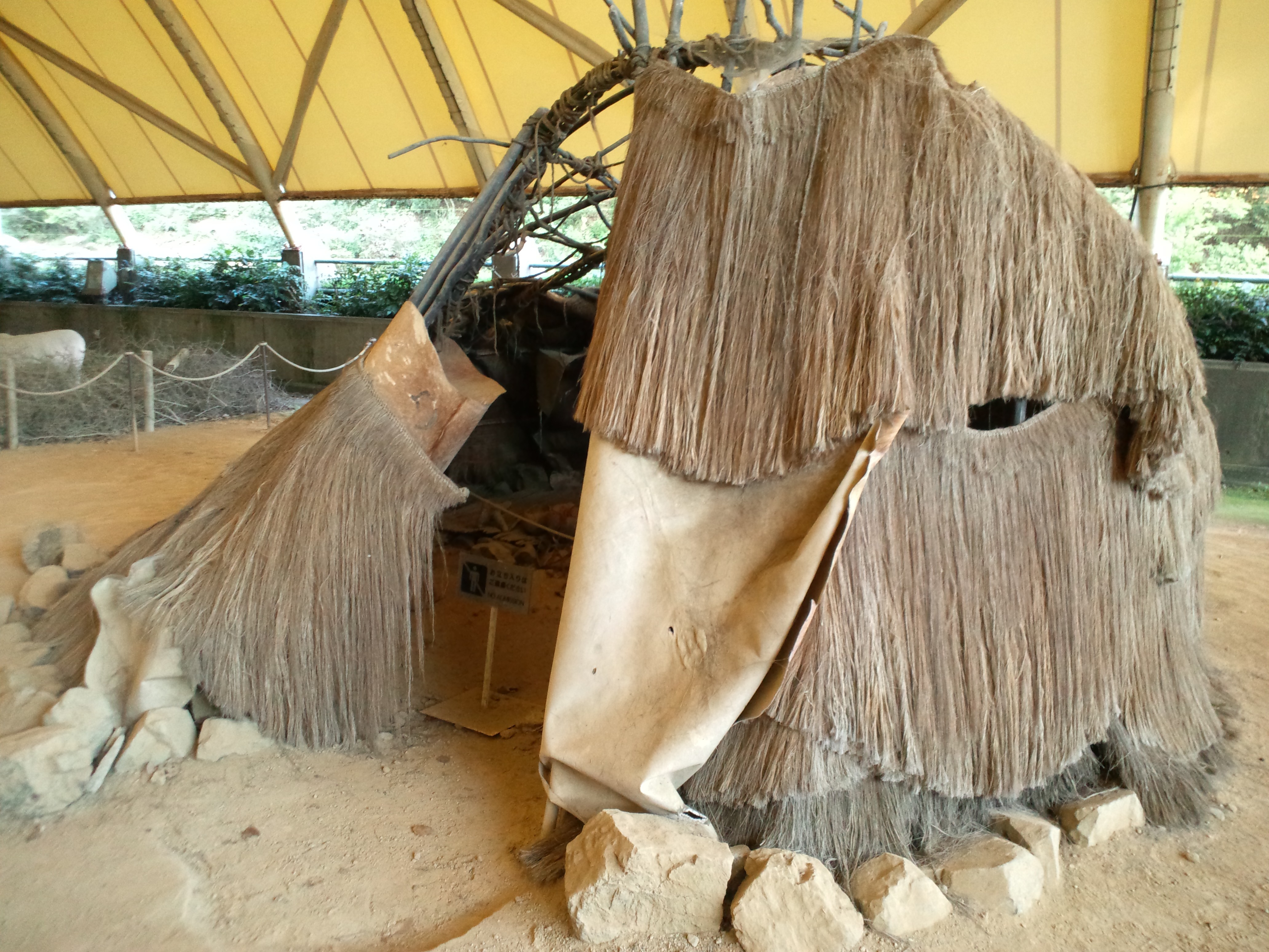 リトルワールド テント村 ケニア レンディーレのテント